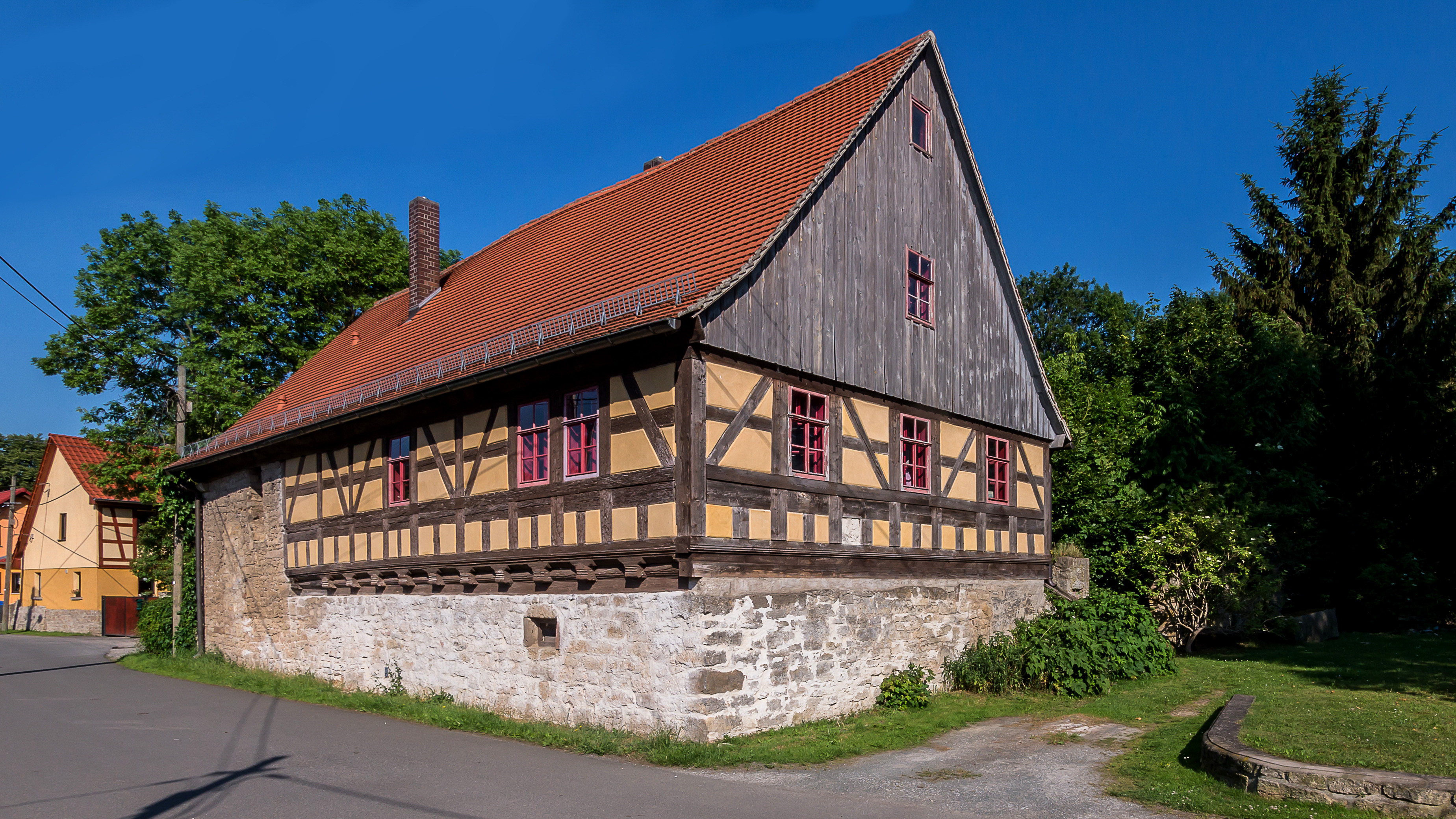 Hetschburg Haus Nr. 19 Wohnhaus